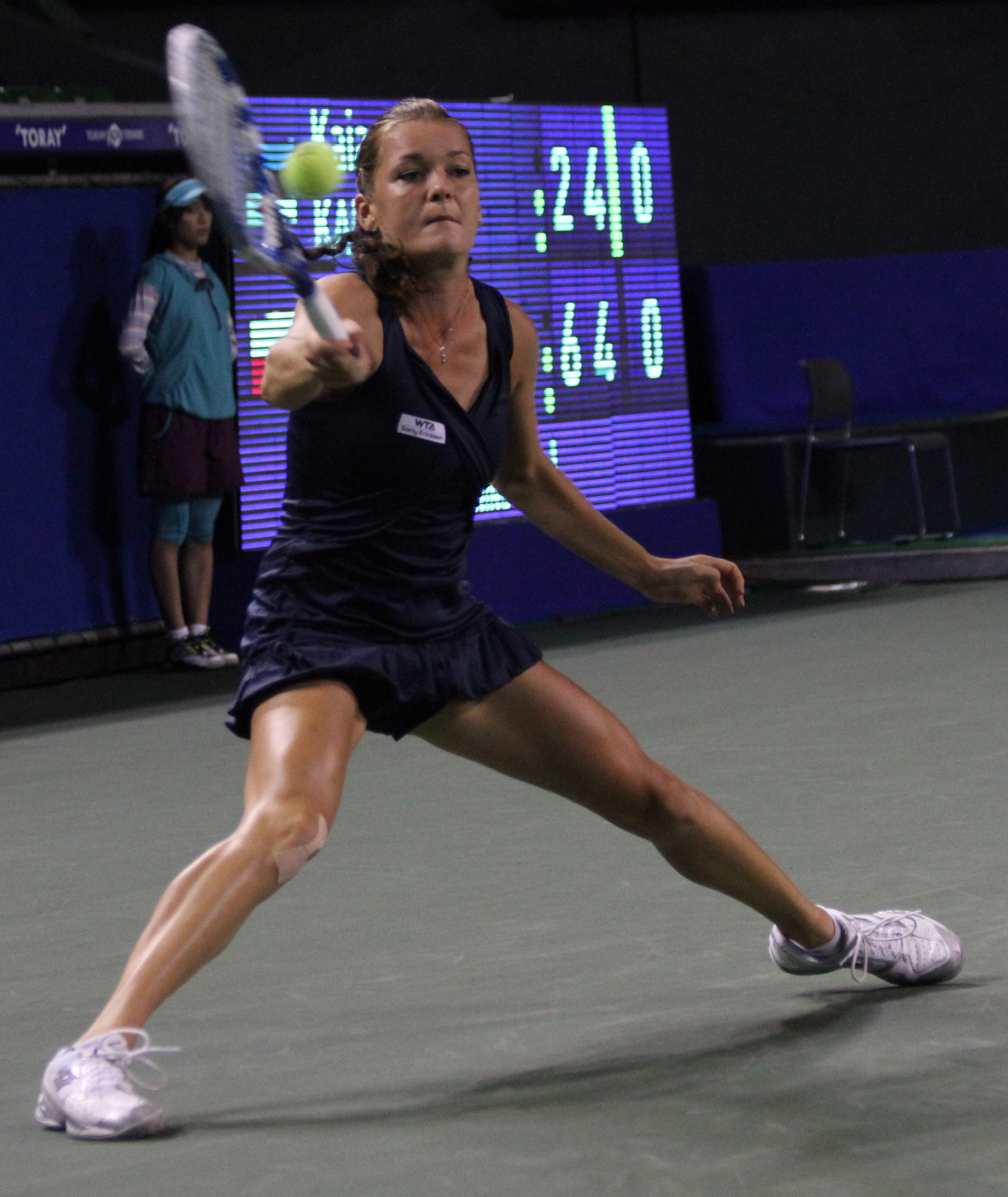 Agnieszka Radwańska at 2011 Pan Pacific Open